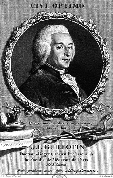 Portrait du docteur JL Guillotin